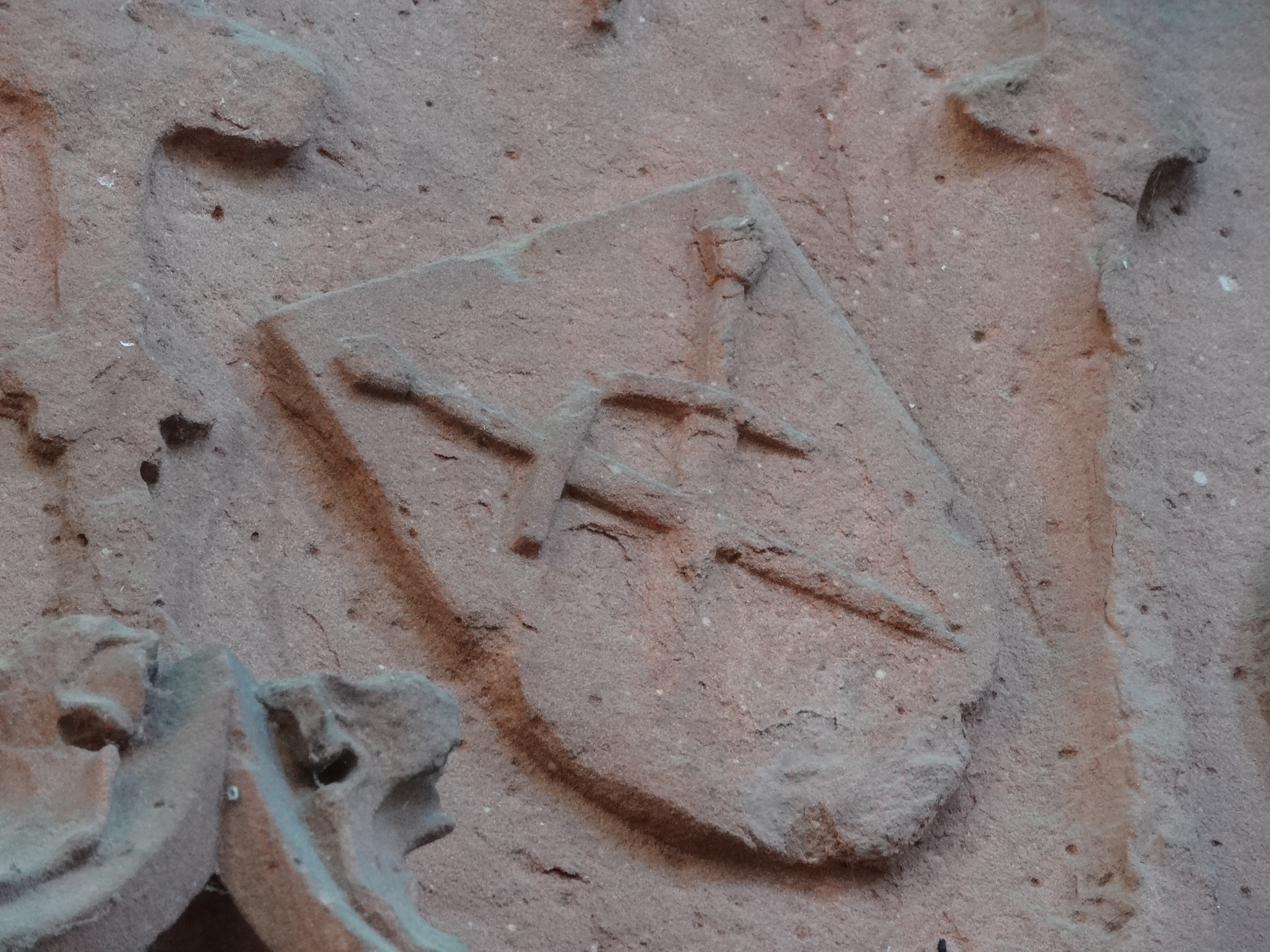 Doppelgrabmahl Johann von Linden und Guda von Bellersheim